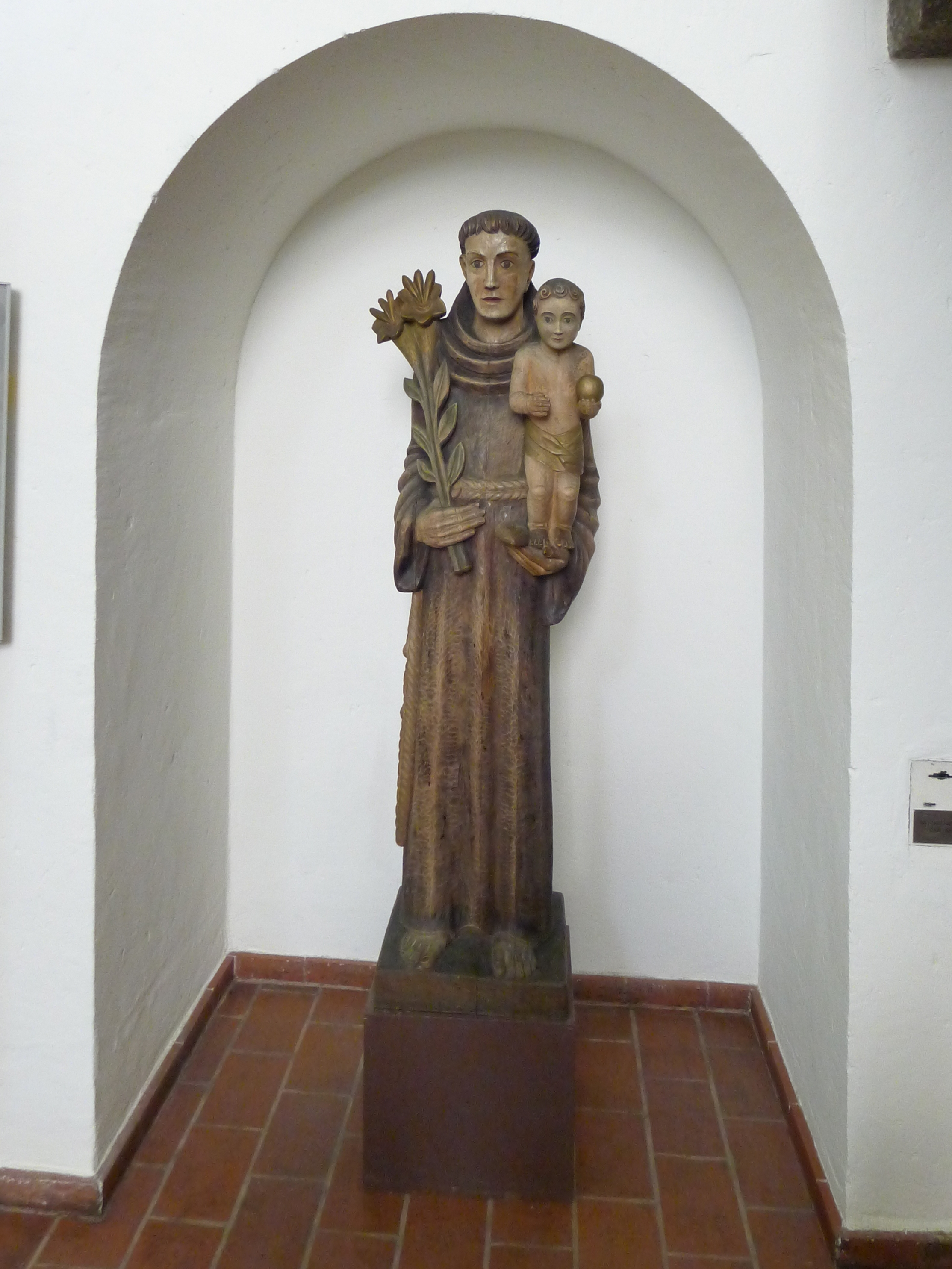 Statue des Heiligen Antonius